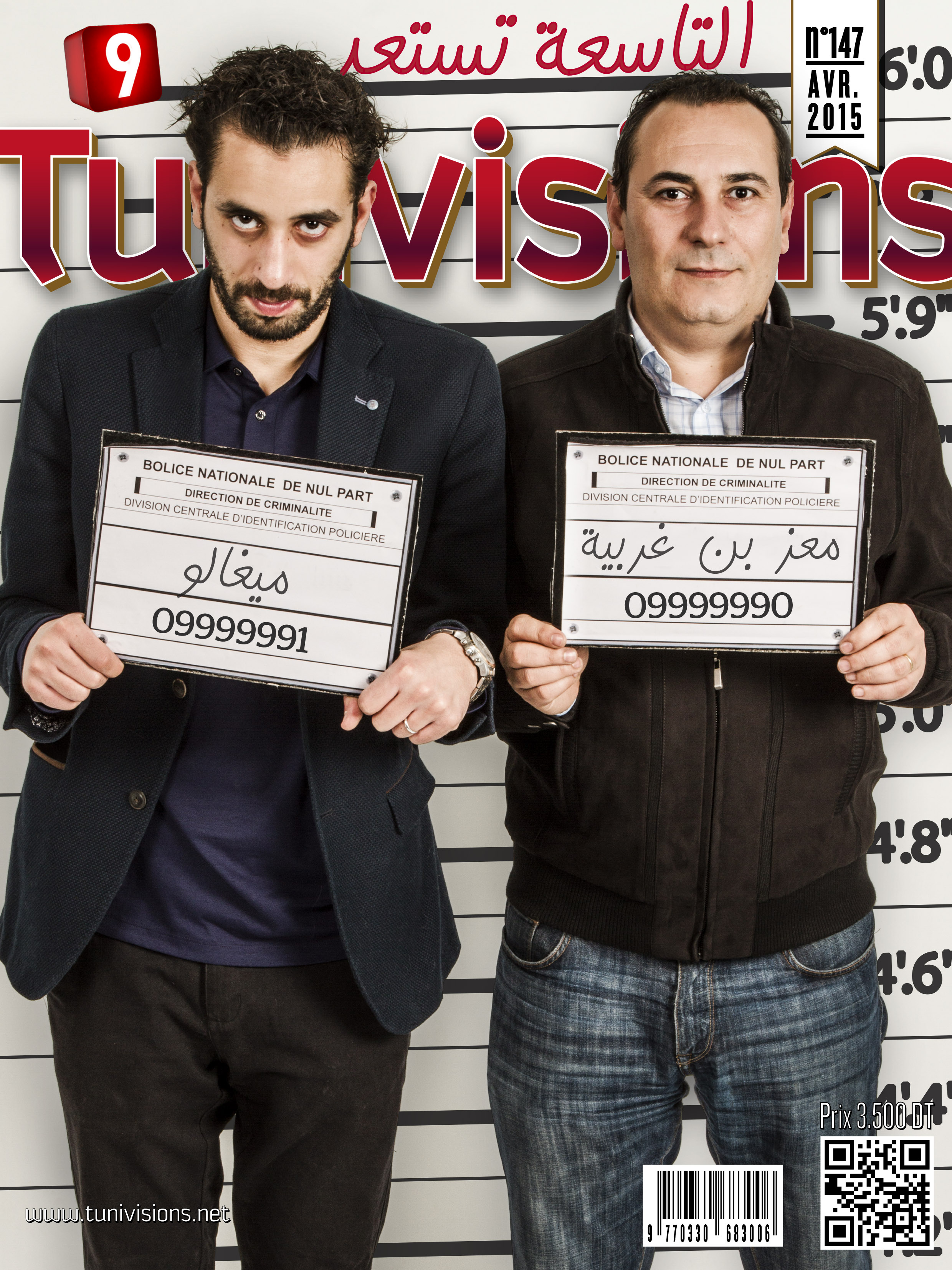 Couverture du numéro 147 du magazine tunisien Tunivisions.